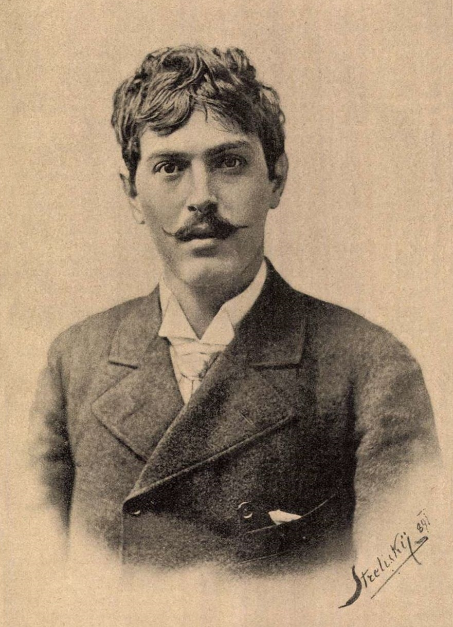 Bródy Sándor arcképe